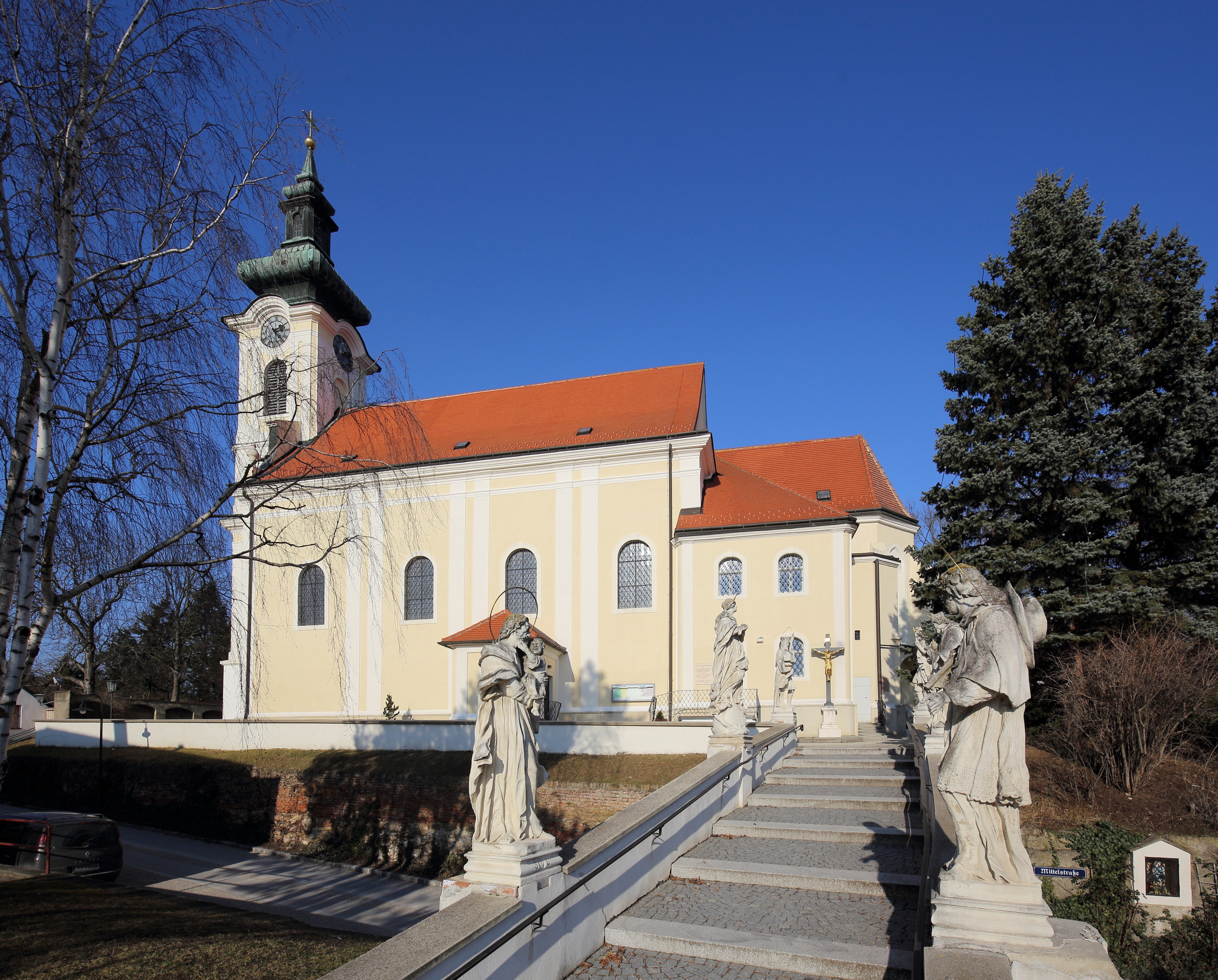 Katholische Pfarrkirche hl. Margaretha in der niederösterreichischen Stadtgemeinde Wolkersdorf im Weinviertel.